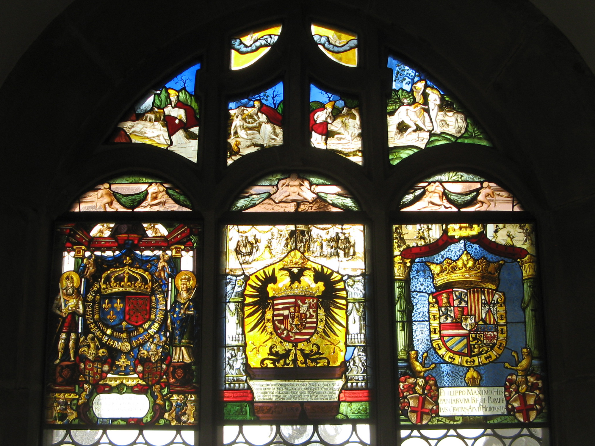 Kreuzgang des Klosters Muri. Fenster S6, gestiftet von Louis XIII (1625), Ferdinand I (1563), Philipp II how Duke of Milan(1580).